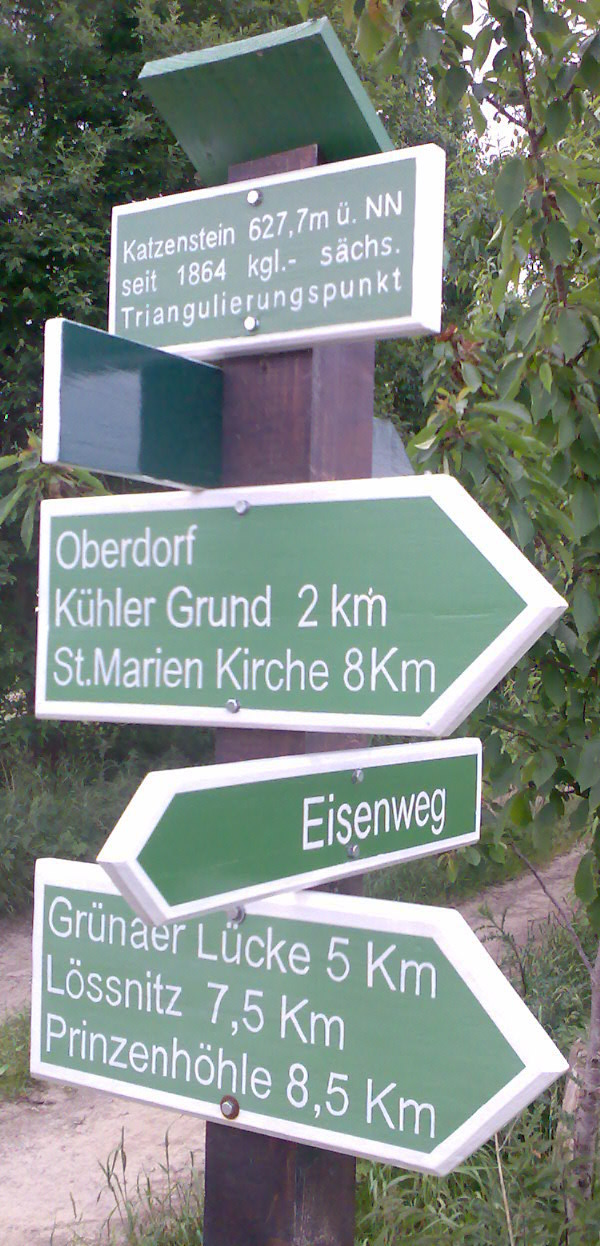 Wegweiser auf dem Berg Katzenstein im Erzgebirge, Sachsen. Höhenangabe auf dem Wegweiser 627,7 Meter, in neusten Wanderkarten 627,4 Meter.